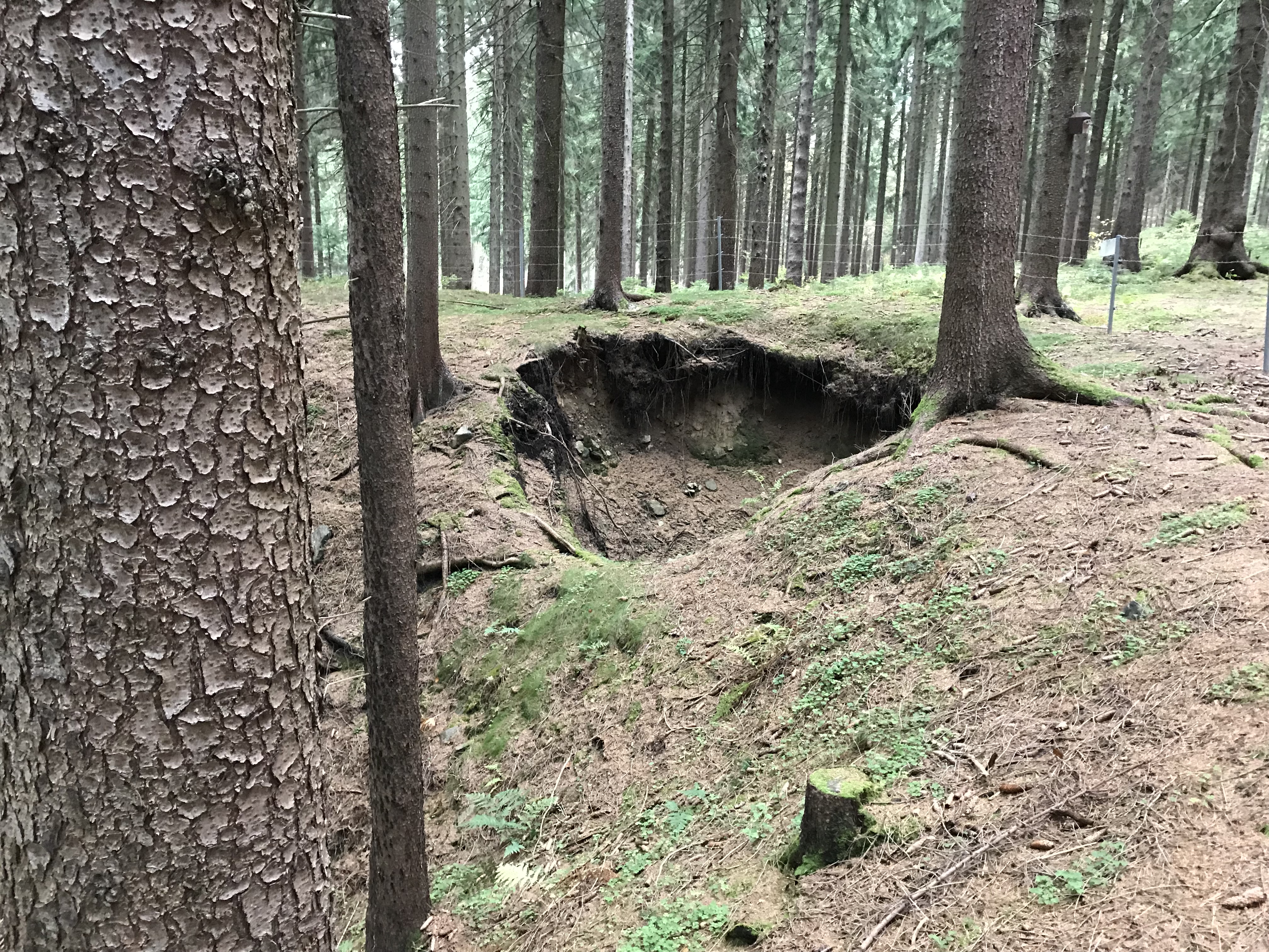 Binge (Einsturzstelle) eines alten Bergwerks.